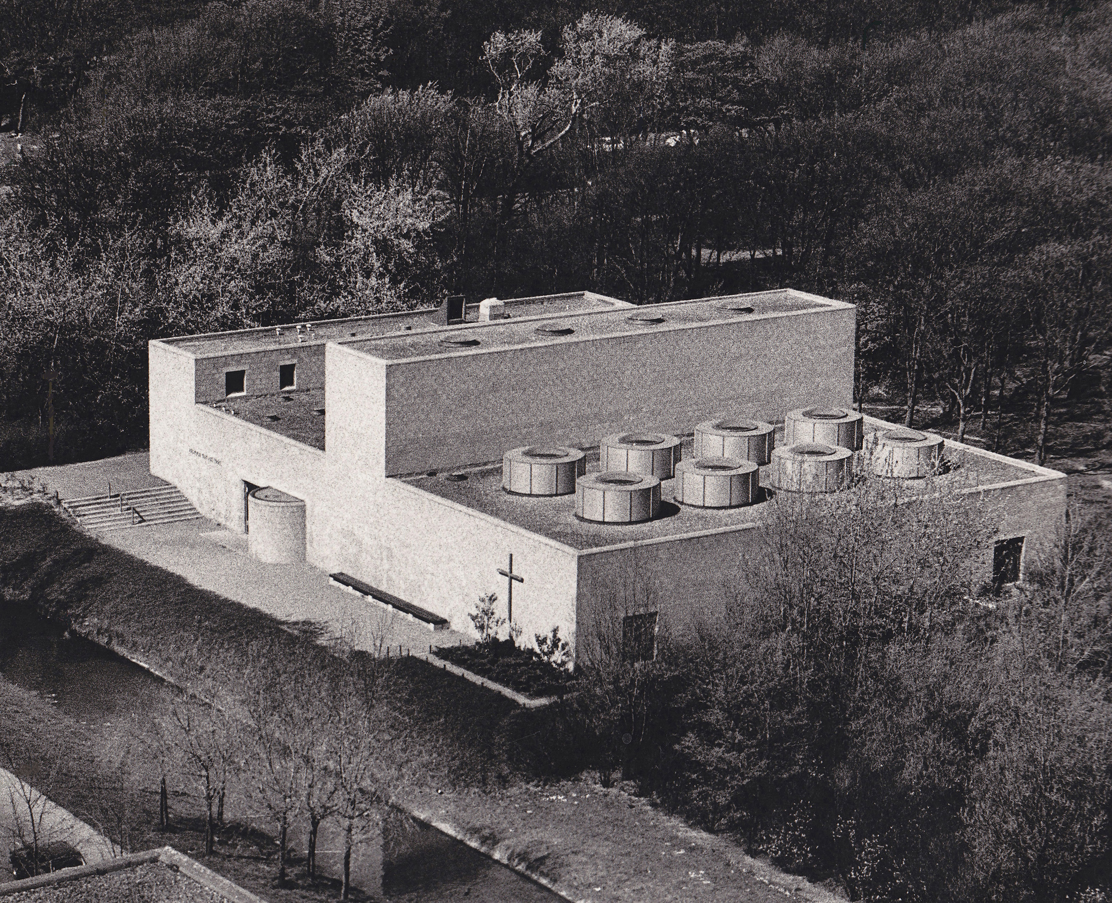 Pastoor van Arskerk, Aaltje Noorderwierstraat 6, Den Haag, (arch. Aldo van Eyck, bouwfase 1968-69).